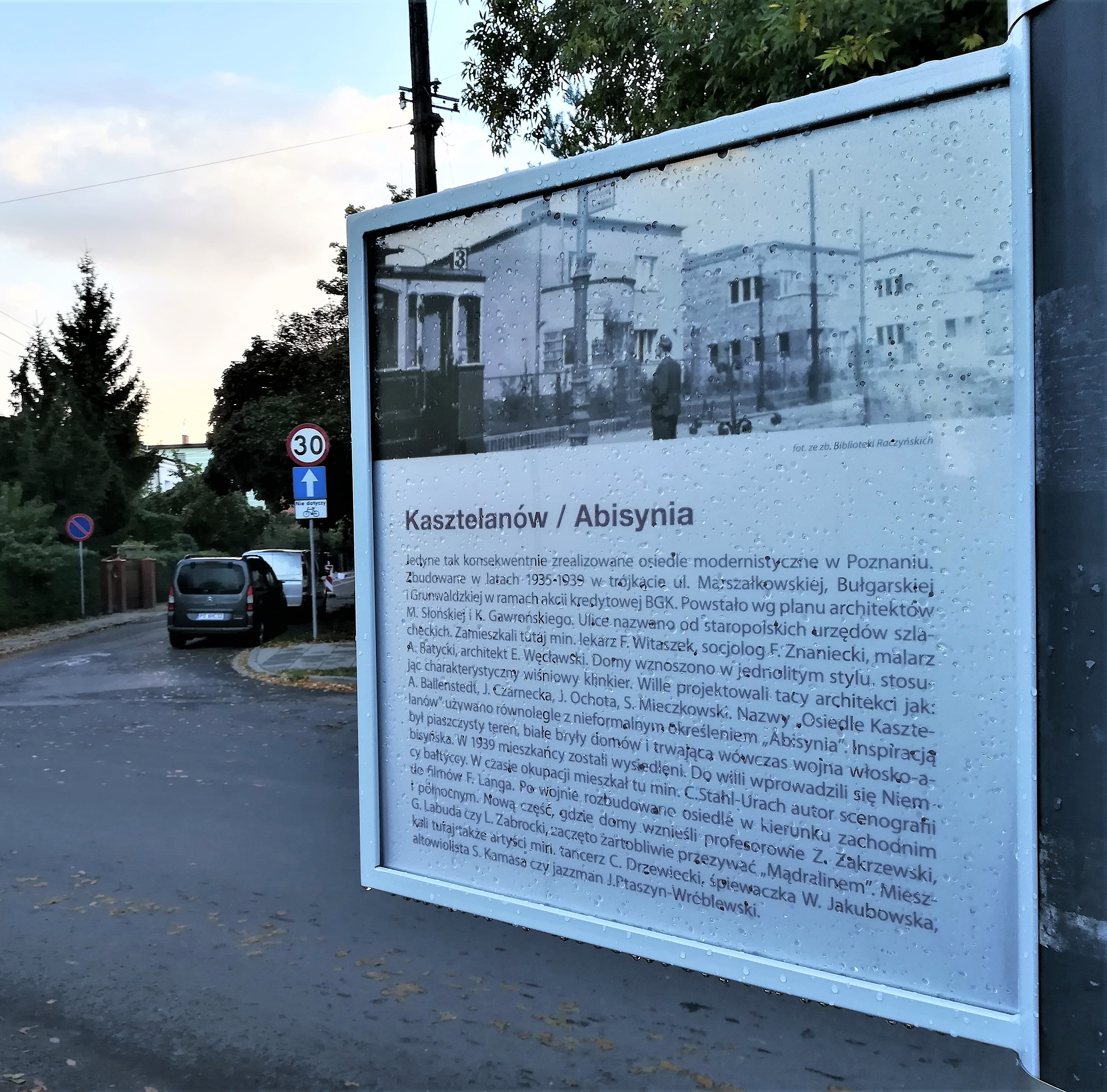 Abisynia (ul. Marszałkowska) w Poznaniu - tabliczka historyczna.